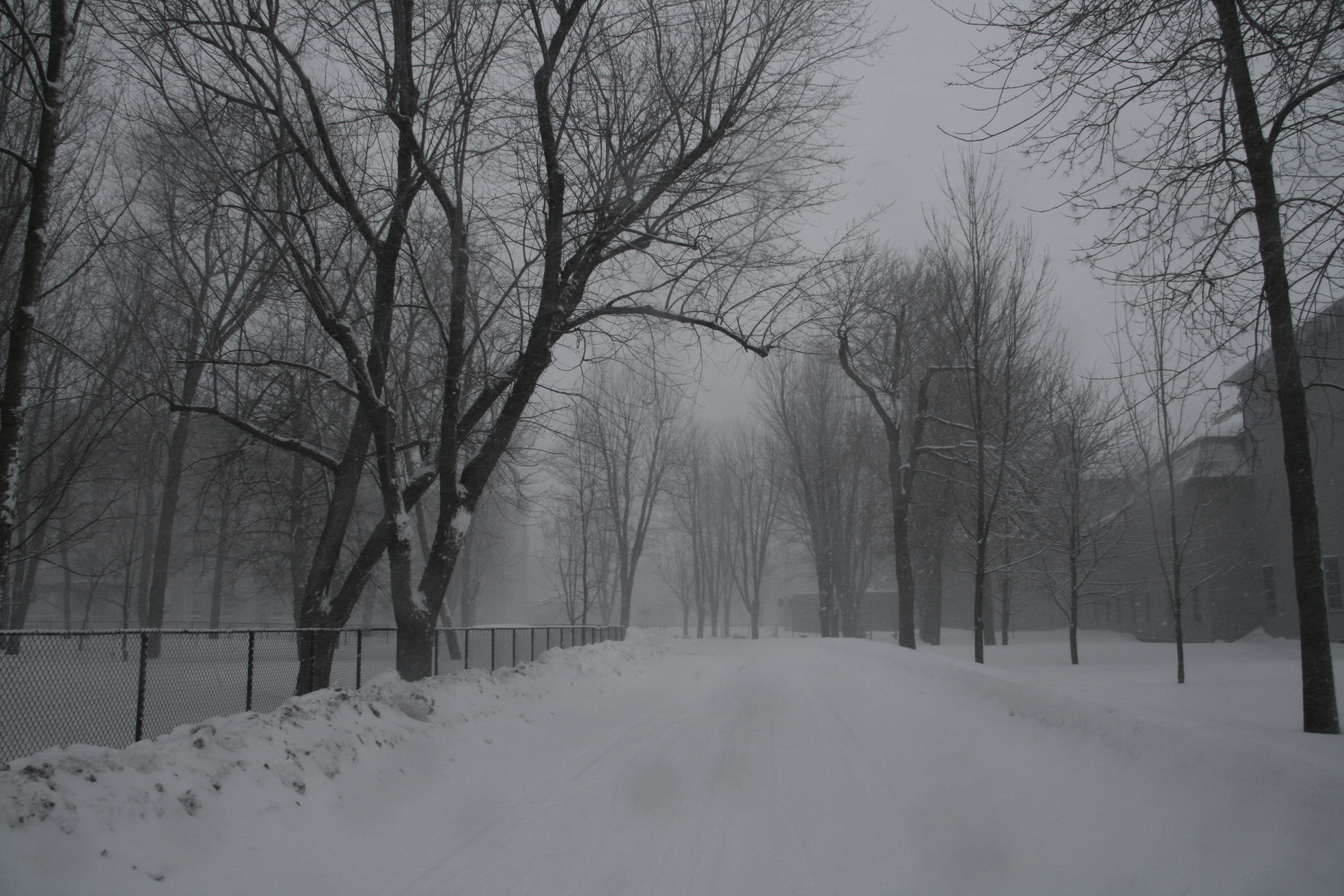 Entrée du Séminaire de Saint-Hyacinthe (Collège Antoine-Girouard)